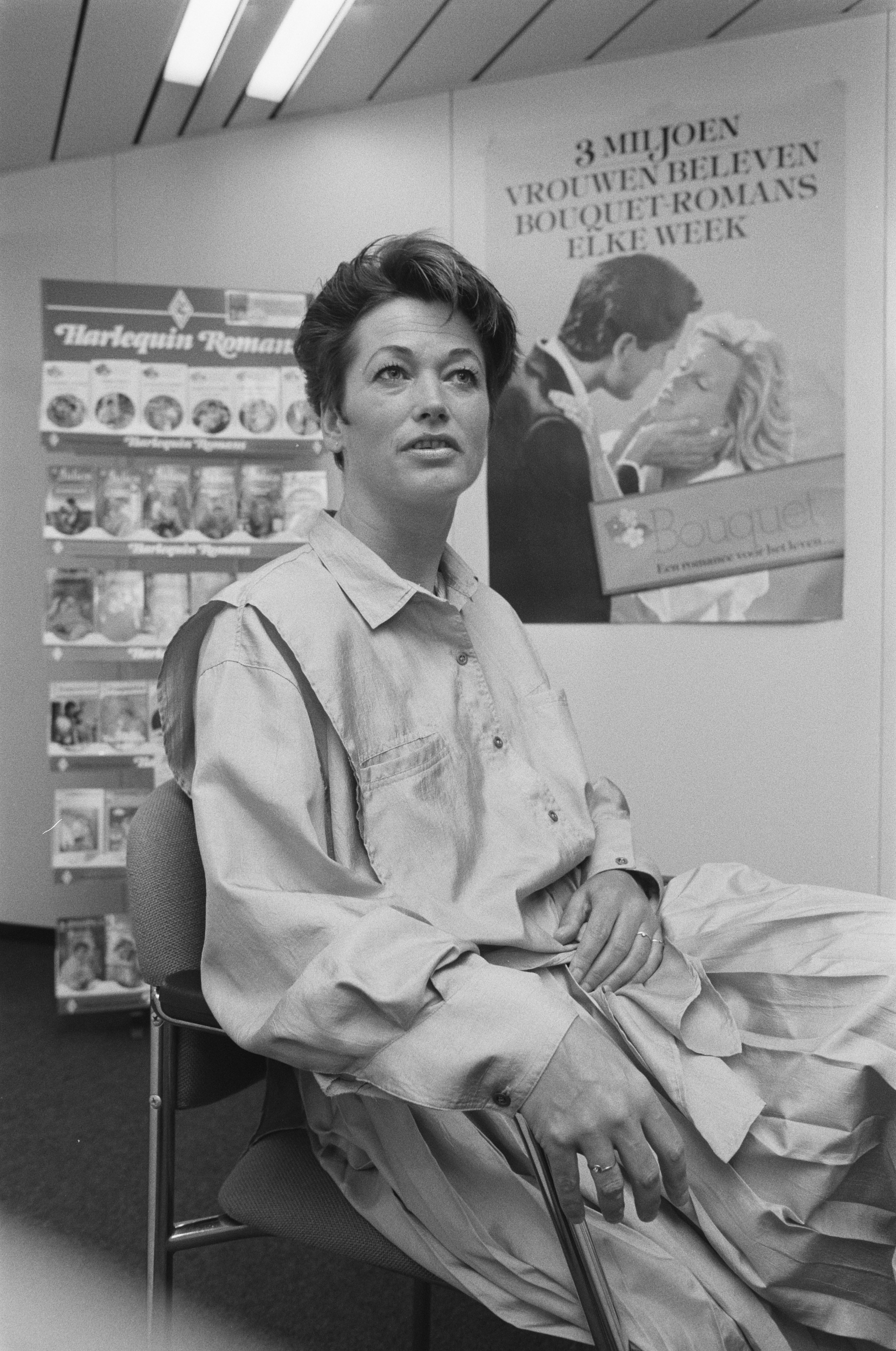 Collectie / Archief : Fotocollectie Anefo Reportage / Serie : [ onbekend ] Beschrijving : Opdracht Gelderlander; Josine Moussy Datum : 28 april 1988 Trefwoorden : liefdesromans, vrouwen Persoonsnaam : Josine Moussy, bouquet, harlequin Fotograaf : Croes, Rob C. / Anefo Auteursrechthebbende : Nationaal Archief Materiaalsoort : Negatief (zwart/wit) Nummer archiefinventaris : bekijk toegang 2.24.01.05 Bestanddeelnummer : 934-2386